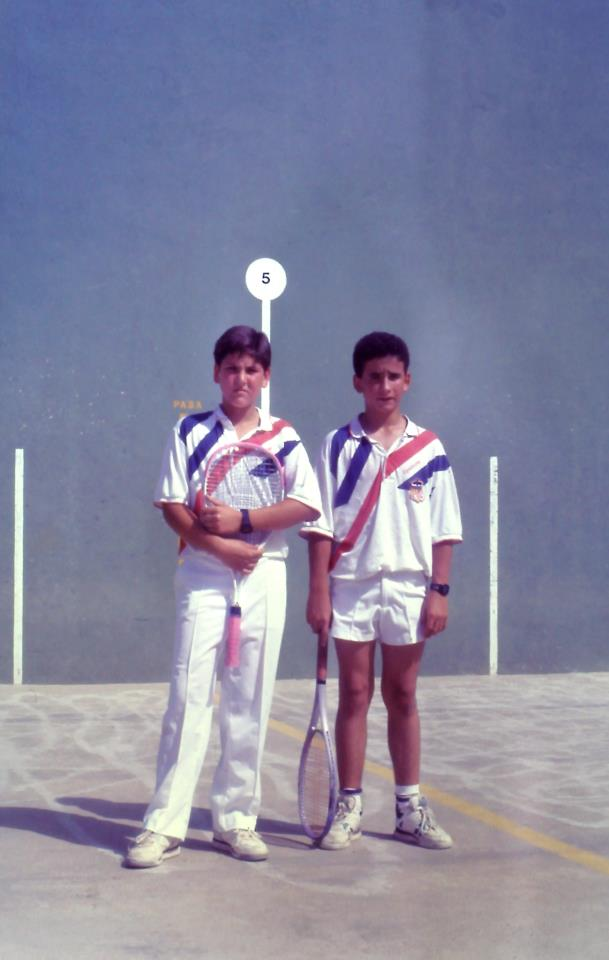 Inicios